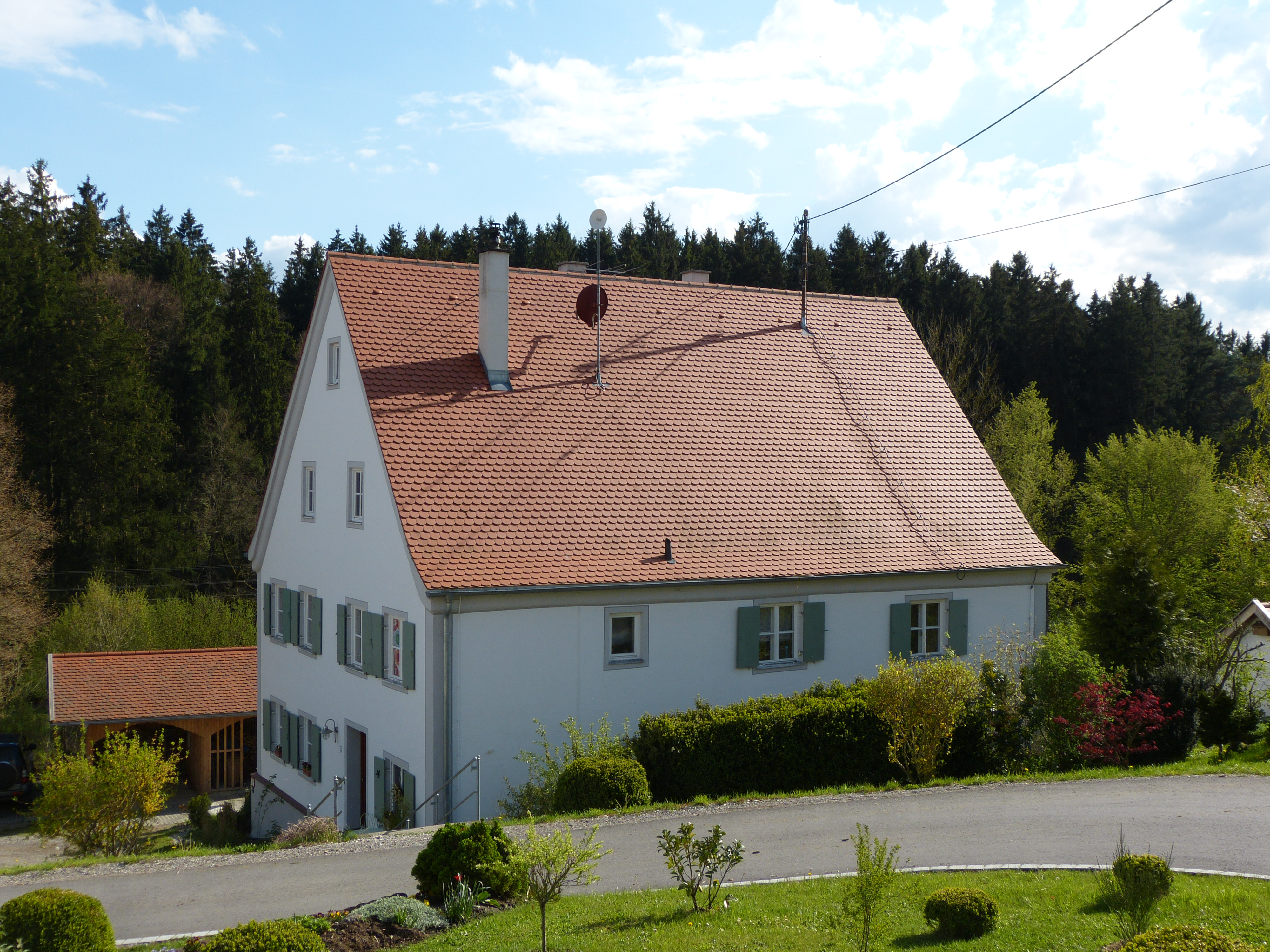 Pfarrhaus, südlich der Kirche im Ortsteil Könghausen, Eppishausen, Landkreis Unterallgäu, Bayern